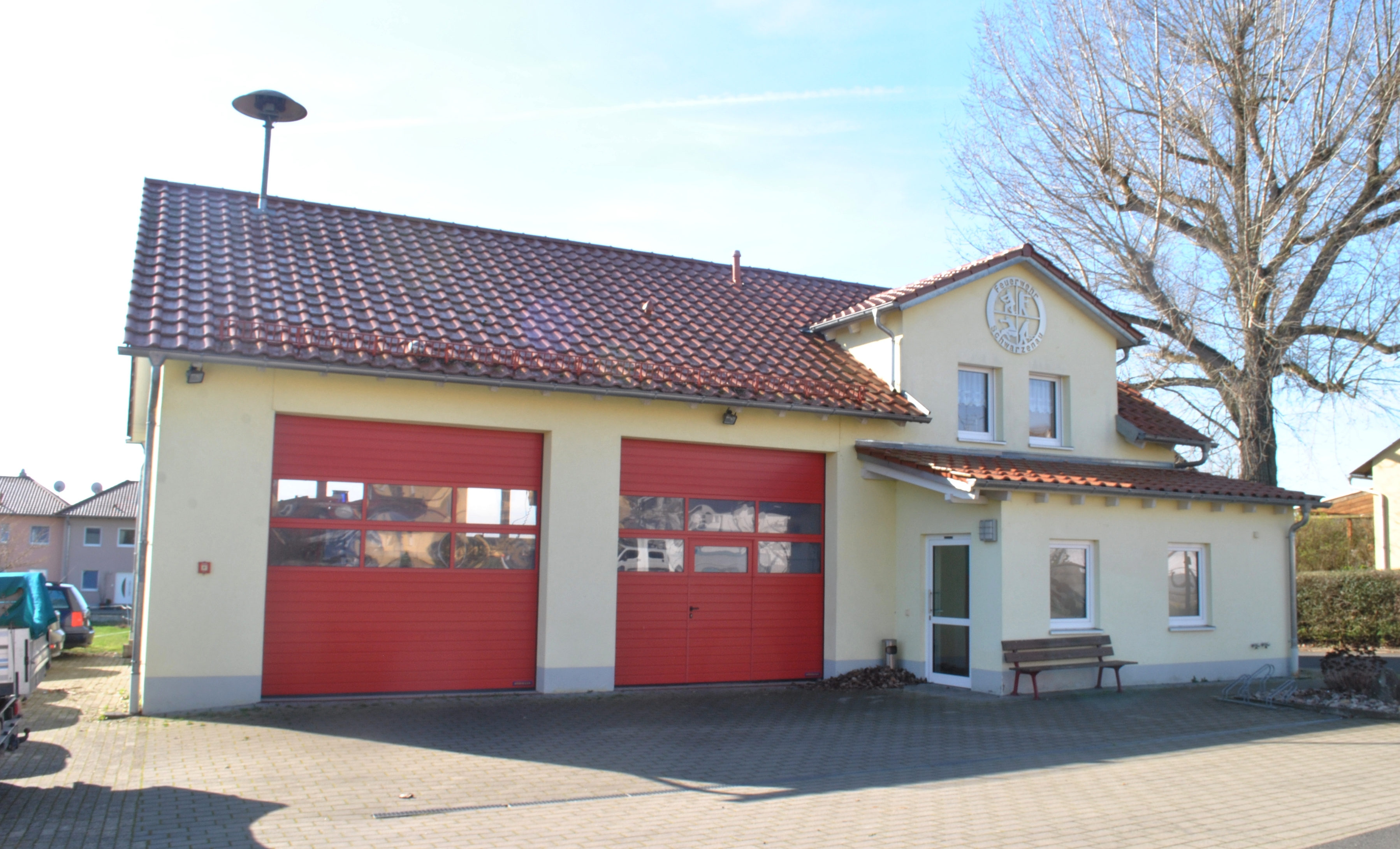 Feuerwehrhaus Schwarzach am Main-Schwarzenau, Dettelbacher Straße